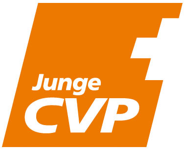 Jcvpdeutsch